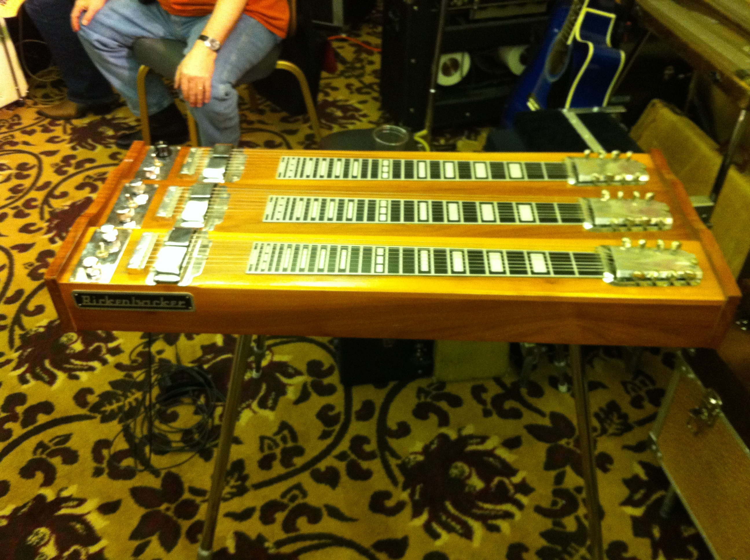 Rickenbacker Console 758 tripleneck steel